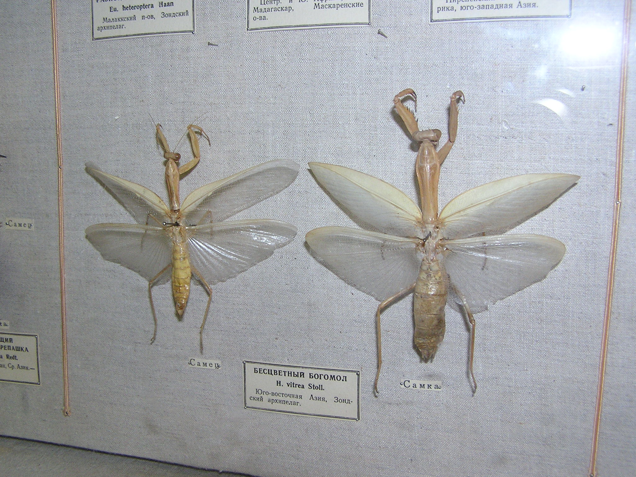 Зоологический музей в Санкт-Петербурге. Бесцветный богомол This photograph taken in Zoological Museum of the Zoological Institute of the Russian Academy of Sciences Note: It is only museum co-ordinates, instead of an area of live animals.